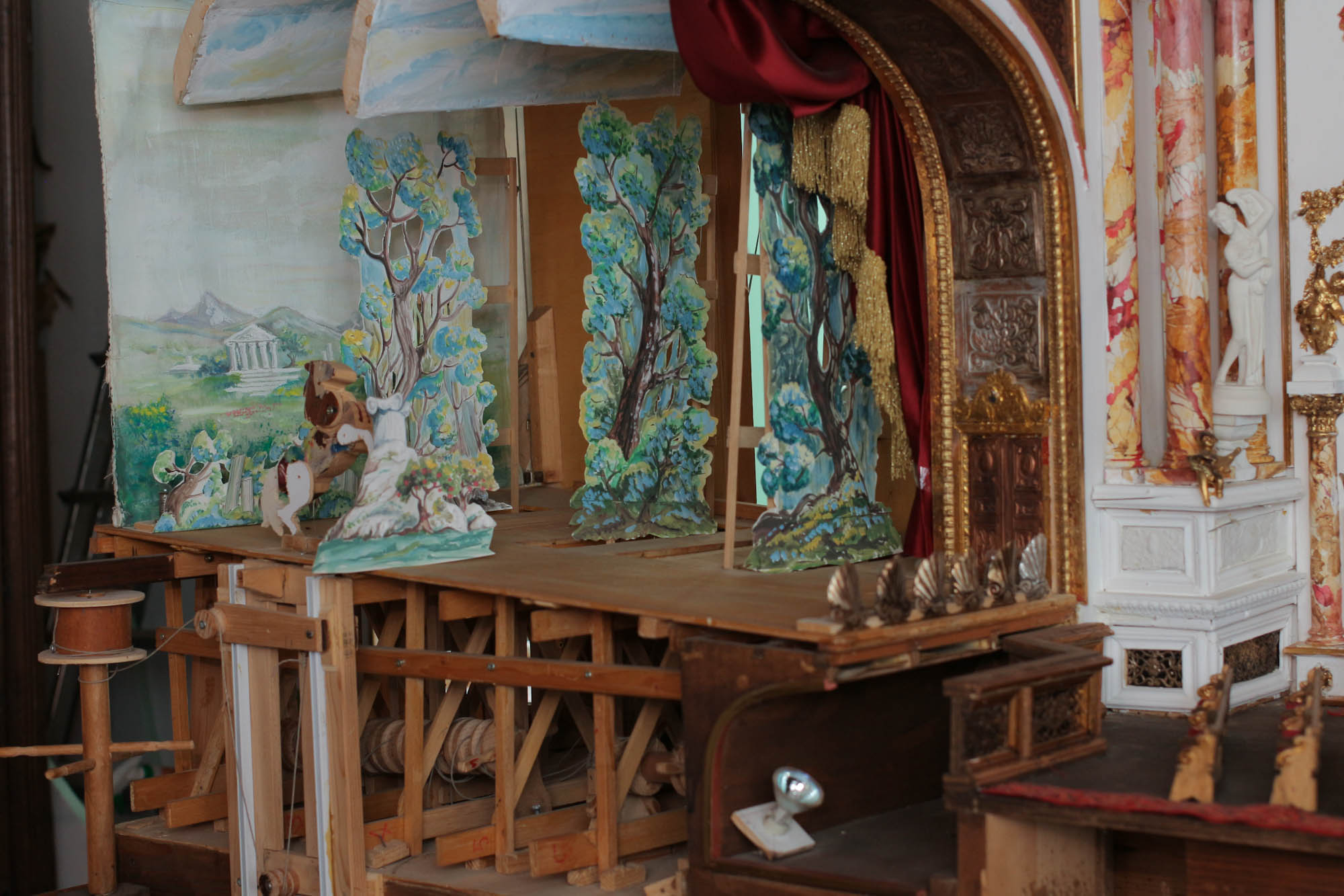 MODELLO-TEATRO-PERGOLA-dettaglio-meccaniche-scenografiche